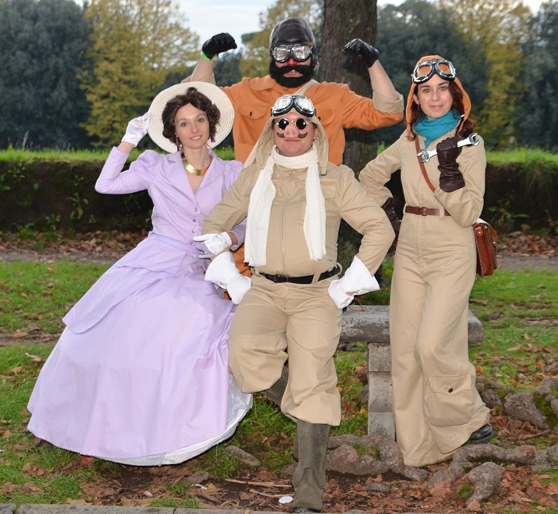 Lucca Comics 2012